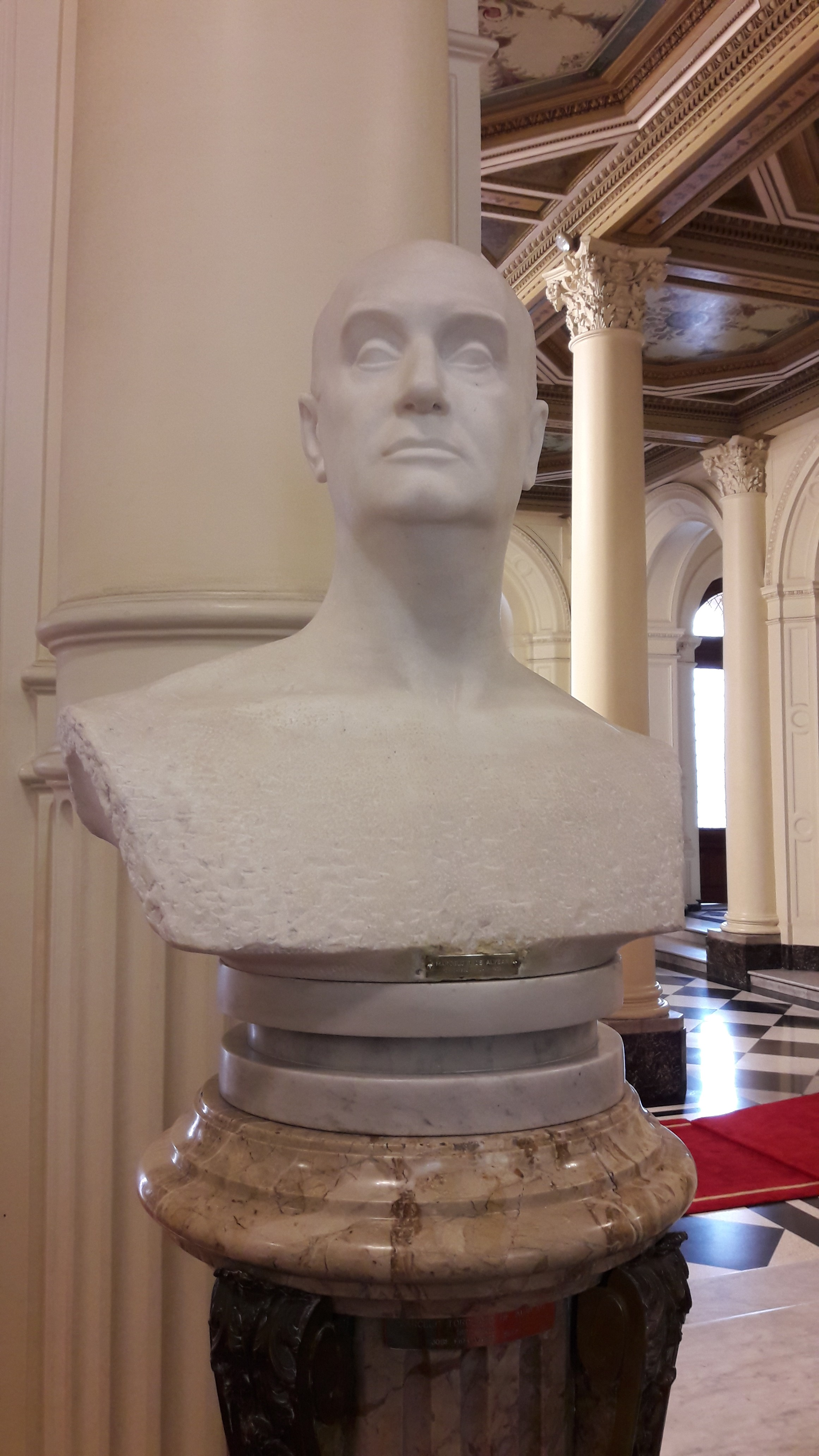 Salón de los Bustos, Casa Rosada.